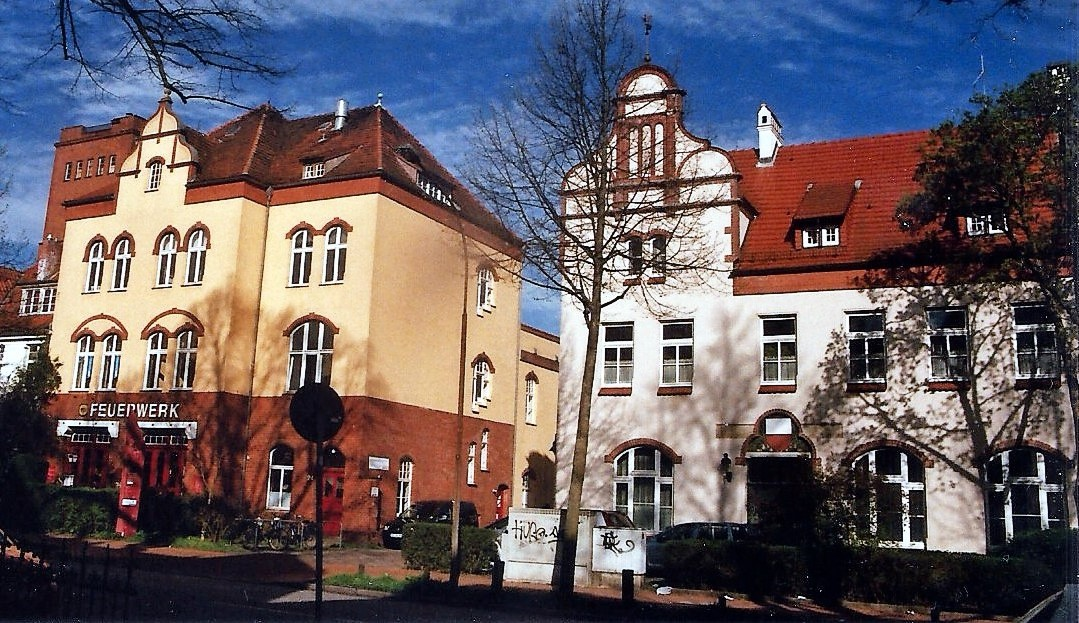 Das Anwachsen der Vorstadt St. Lorenz hatte den Bau einer Feuerwache daselbst notwendig gemacht, die am 13. Januar dem Betrieb übergeben wurde. Einige Wochen später wurde auch die daneben liegende Polizeiwache für die Benutzung fertiggestellt.